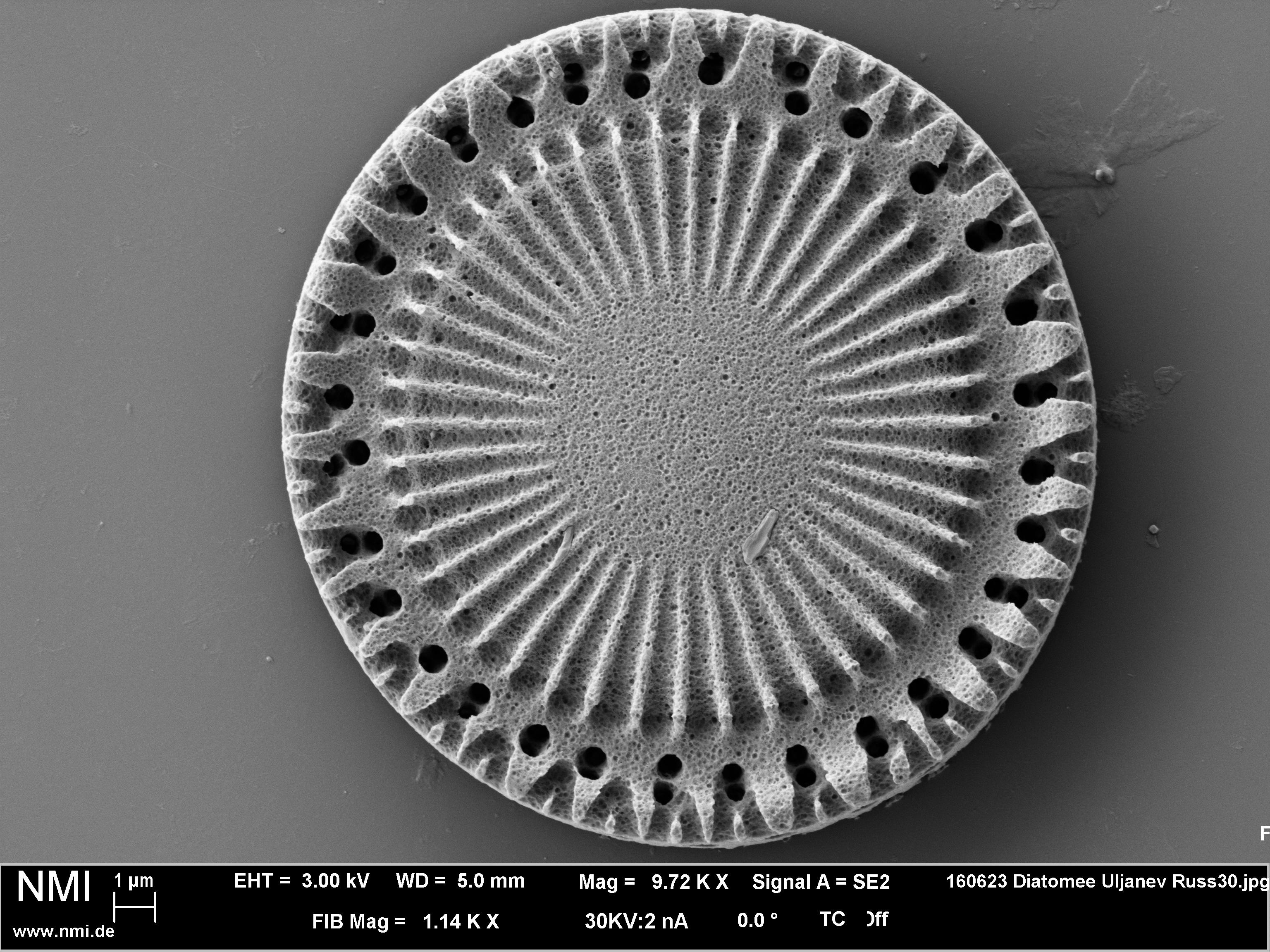 Диатомит Инзенского месторождения, электронный микроскоп